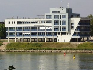 Bild des Ostasieninstituts von der Mannheimer Rheinseite aus gesehen.